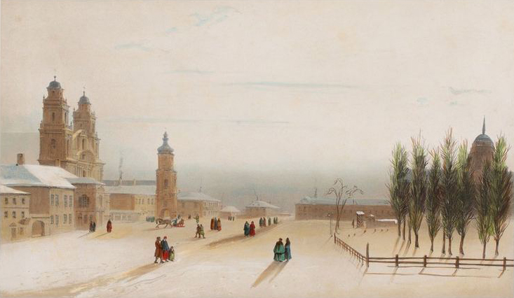 Беларуская (тарашкевіца): Менск (Miensk), пляц Высокі Рынак (plac Vysoki Rynak). Катэдра і калегіюм езуітаў.